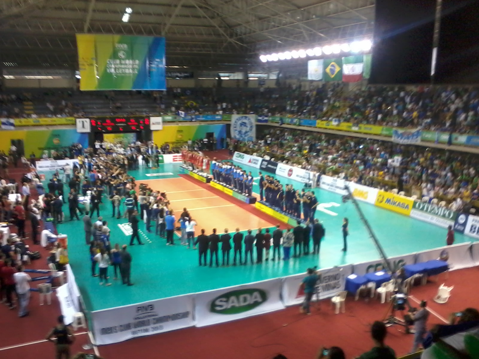 Pódio do Campeonato Mundial de Clubes de Voleibol Masculino de 2013 (Ginásio Divino Braga, Betim)